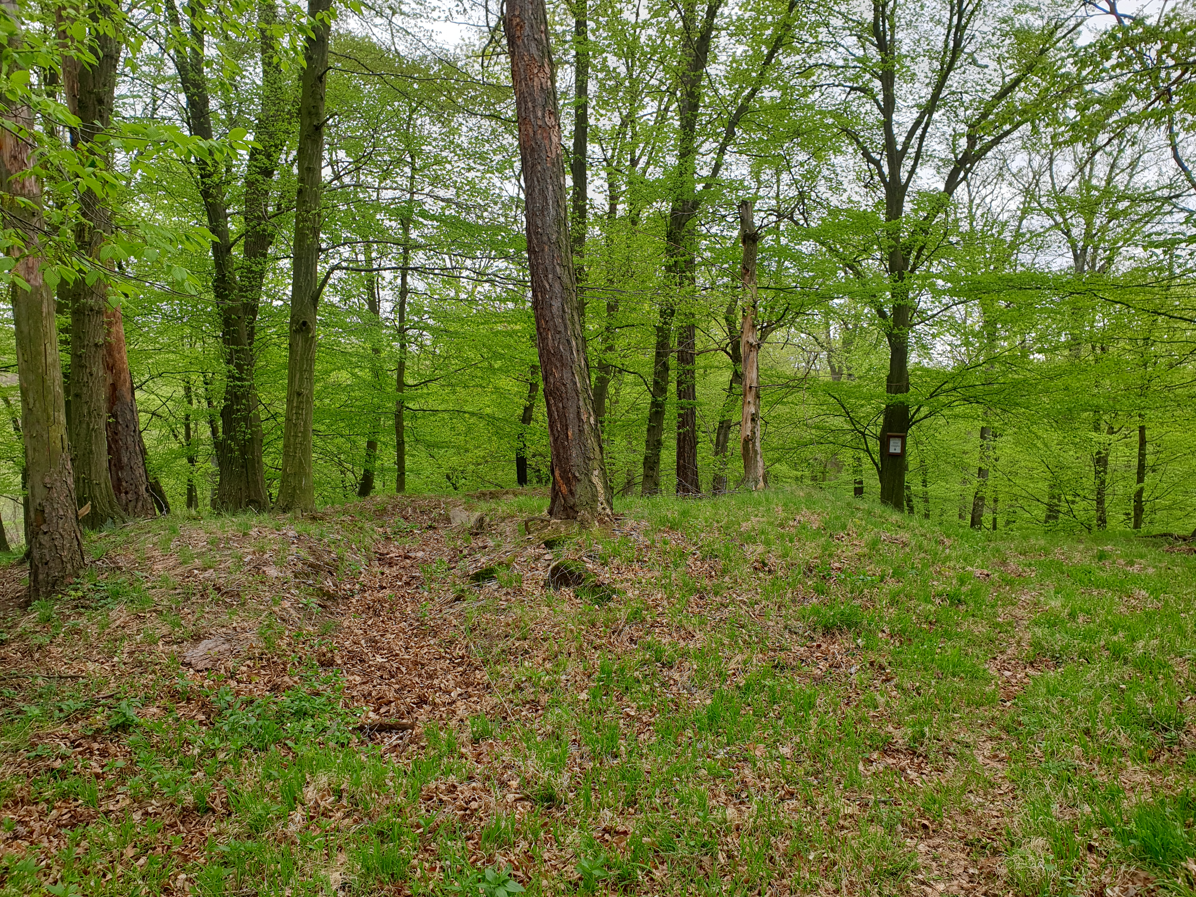 Starý Plumlov